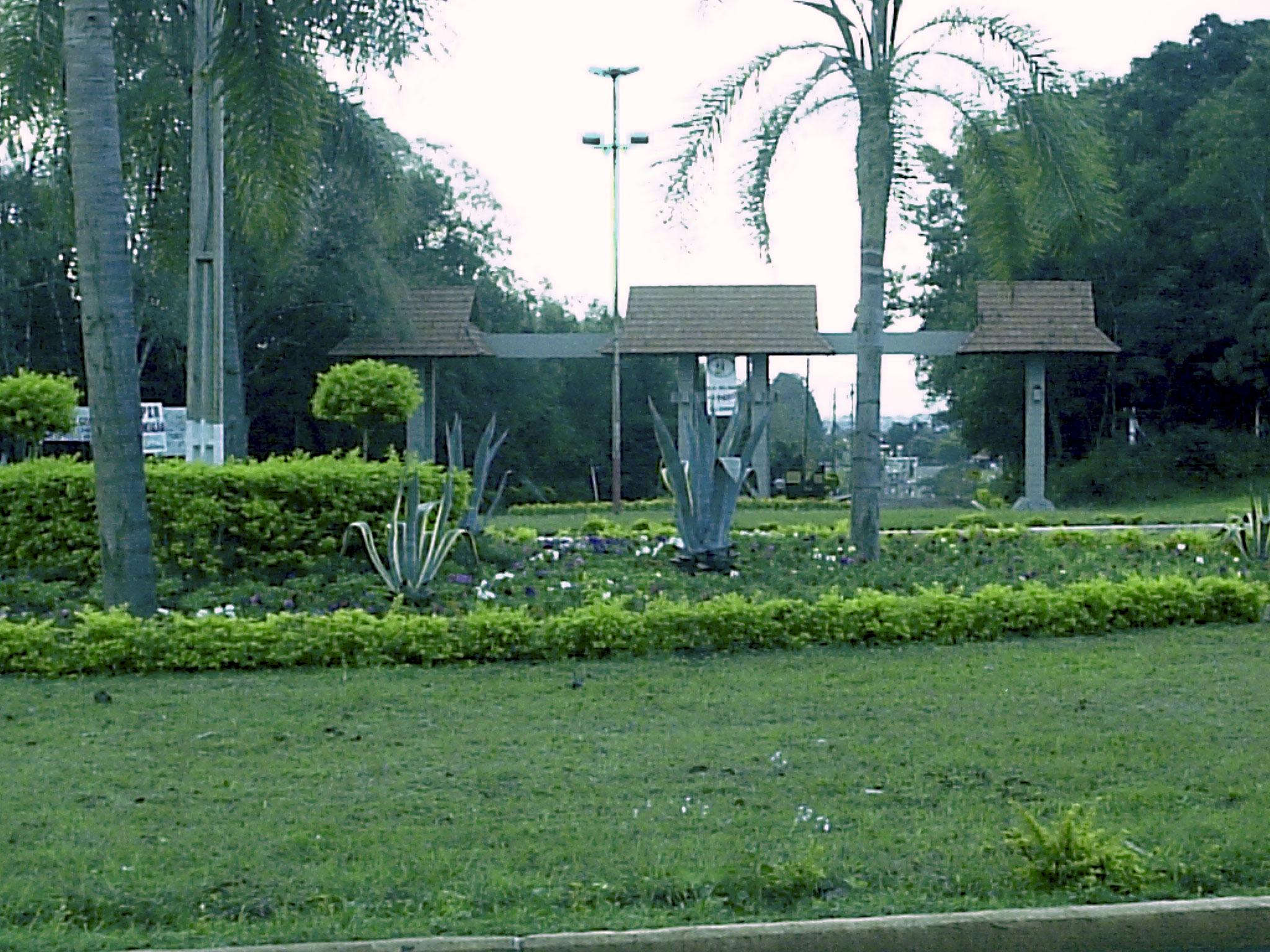 Pórtico de entrada de Guarani das Missões, Rio Grande do Sul, Brasil.